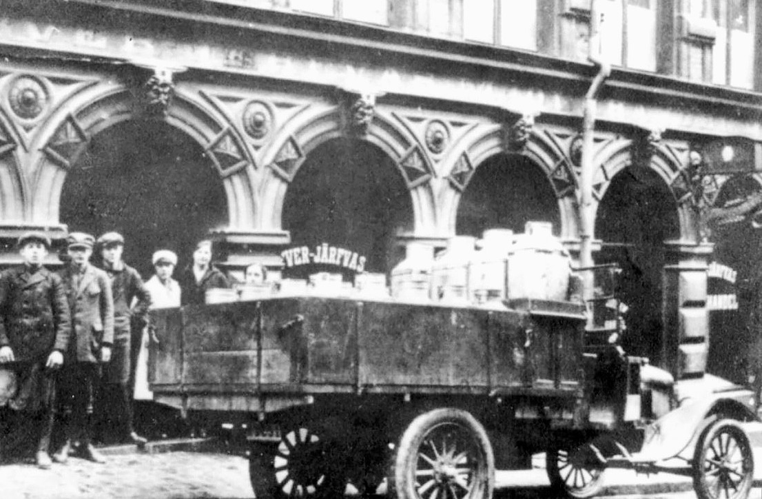 Öfver Järfva Mjölkhandel. Mejeri och huvudbutik på Norra Smedjegatan, numera Gallerian.